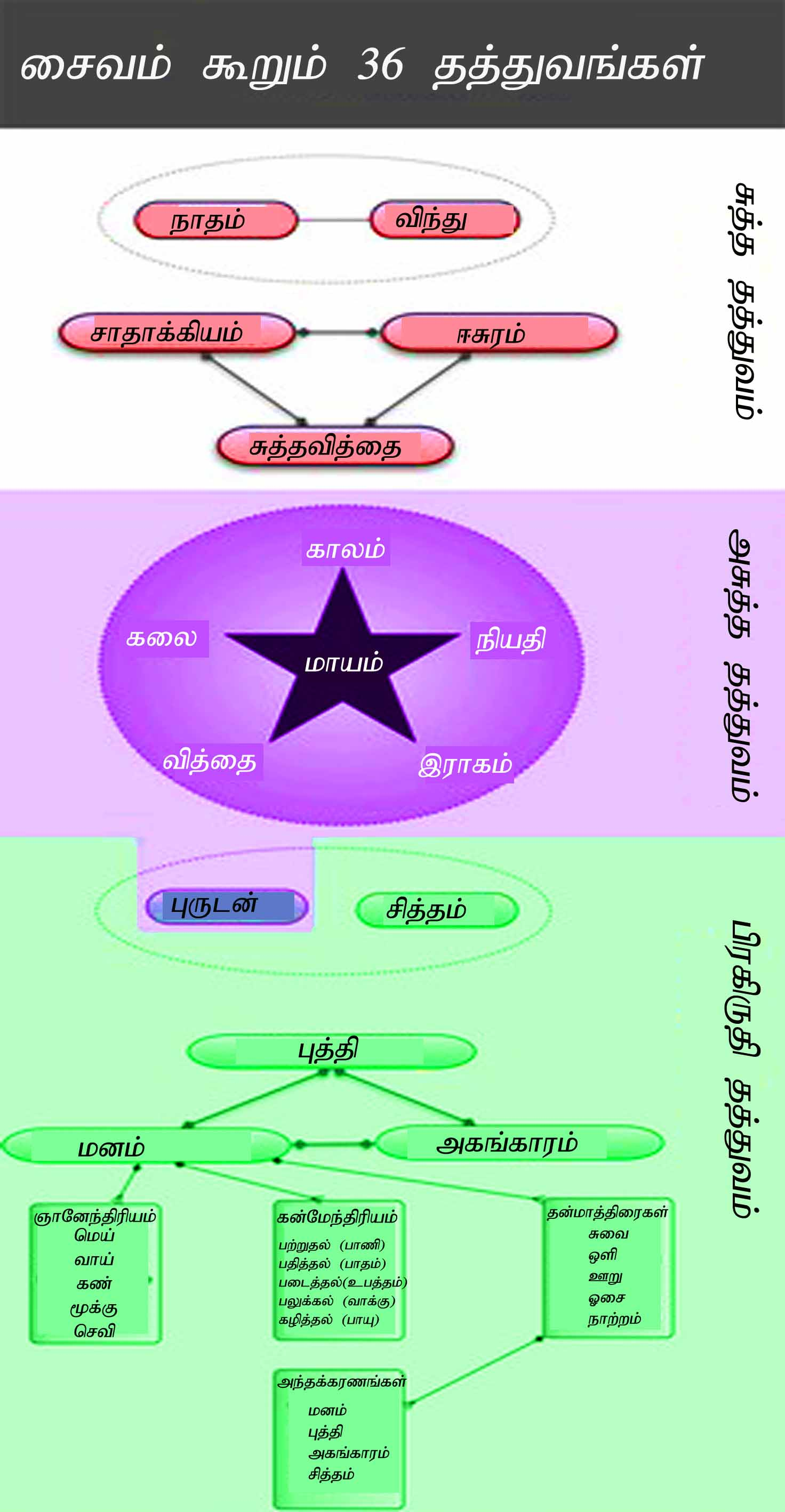 36 தத்துவங்கள் - ஒரு எளிய வரைபடம்.